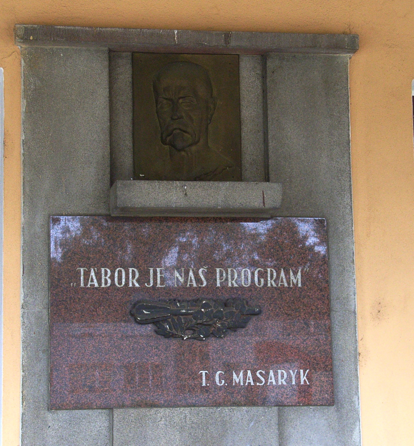 Pamětní deska na návštěvu T.G.Masaryka v r.1918